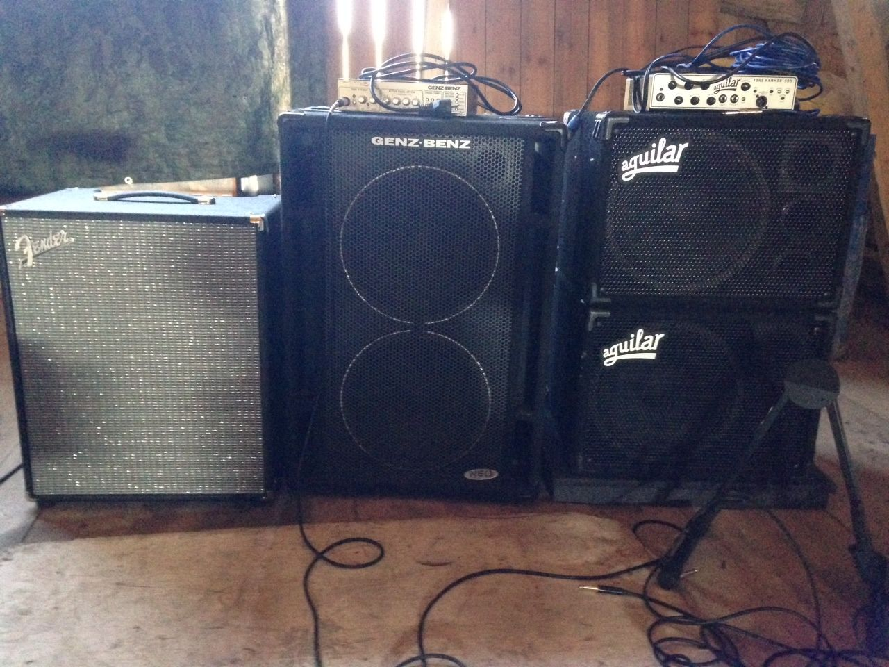 Amps:cabs